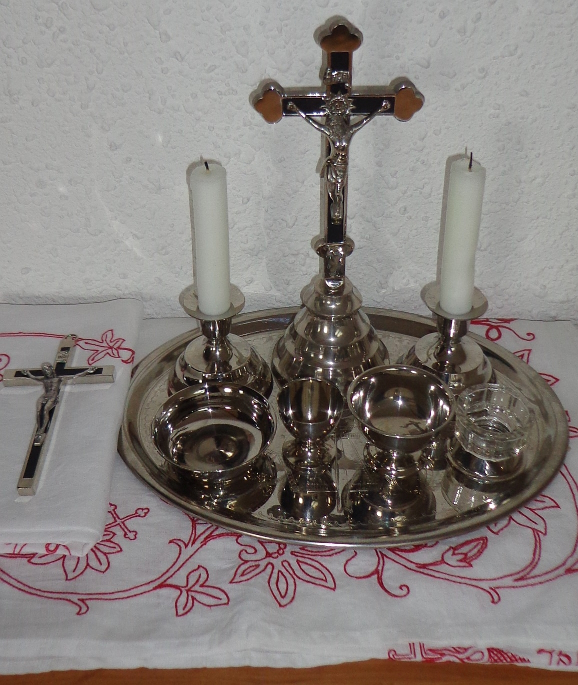 Versehgarnitur in kompletter Ausstattung: links Sterbekreuz, darunter Krankenserviette und Priesterserviette, rechts Tablett mit Standkreuz, Kerzenleuchtern und vier Schalen (Salz für den Priester, Krankenöl, Krankenpatene, Glasschale für Weihwasser), darunter Tischtuch.